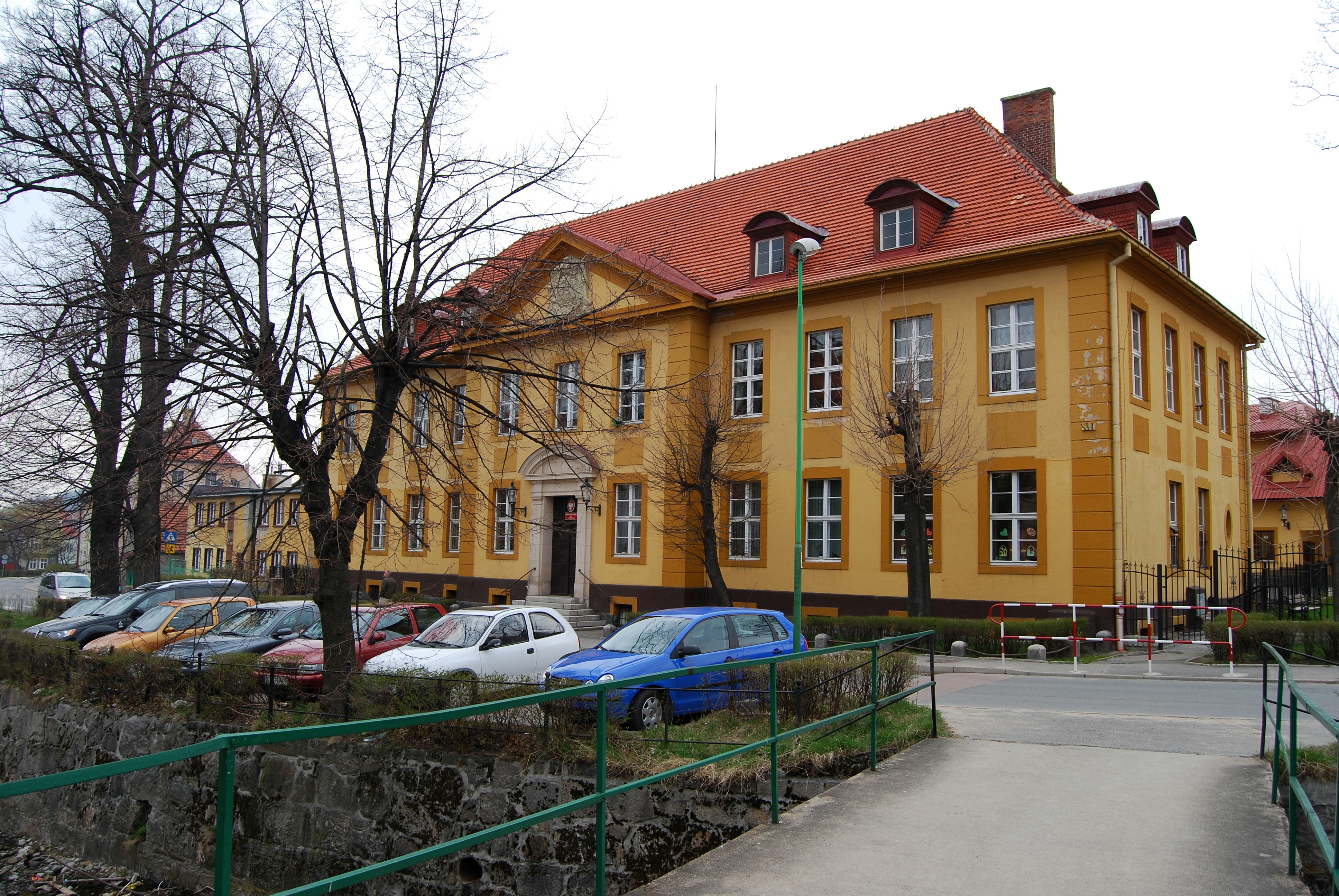 Kowary, ul. Staszica 16 - dawny sąd, obecnie jeden z budynków szkoły podstawowej nr 1 (zabytek nr 1073/J z dn. 10.05.91)